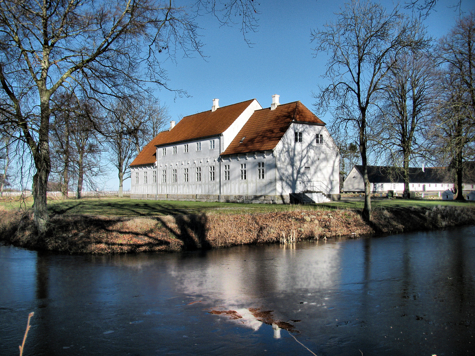 Lerbæk Hovedgård north of Frederikshavn, Nordjylland, Denmark